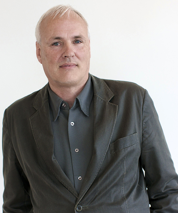 Porträtt